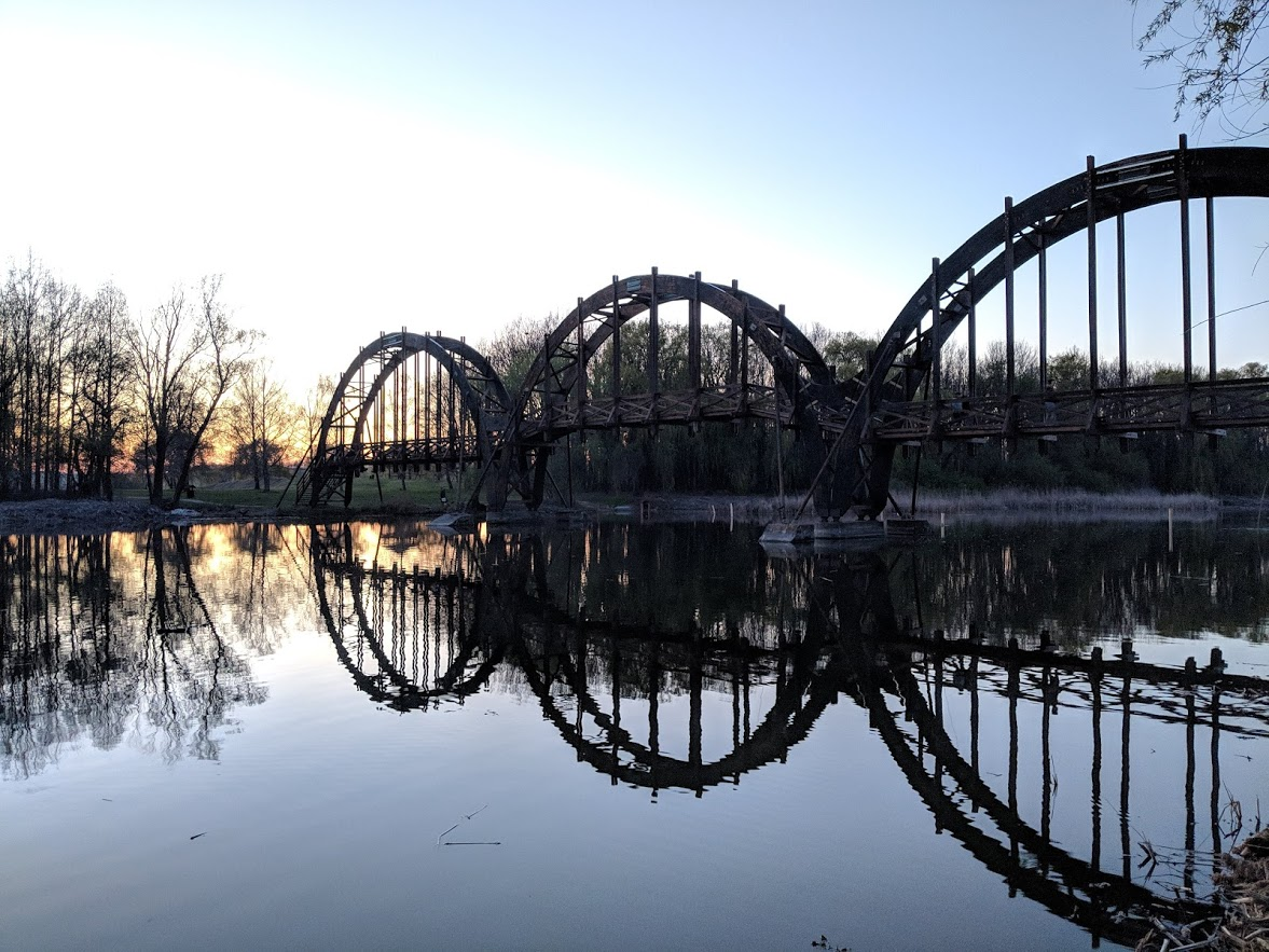 A tükröződő Kányavári-híd